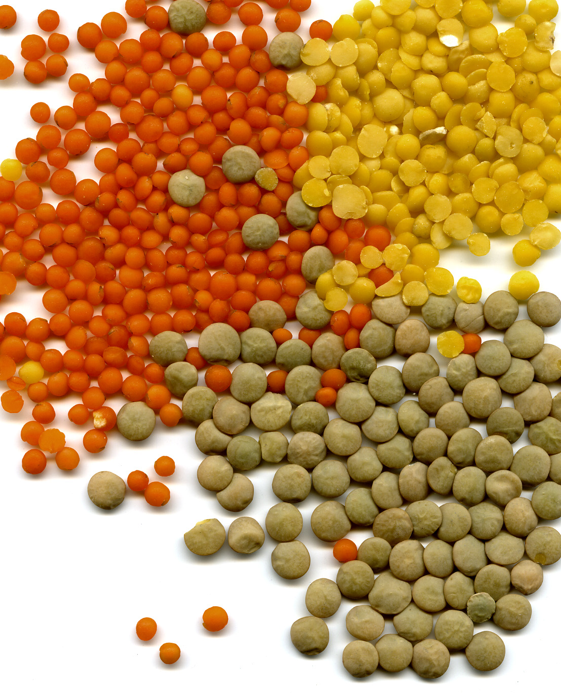 Geschälte rote und gelbe Linsen, grüne Tellerlinsen.